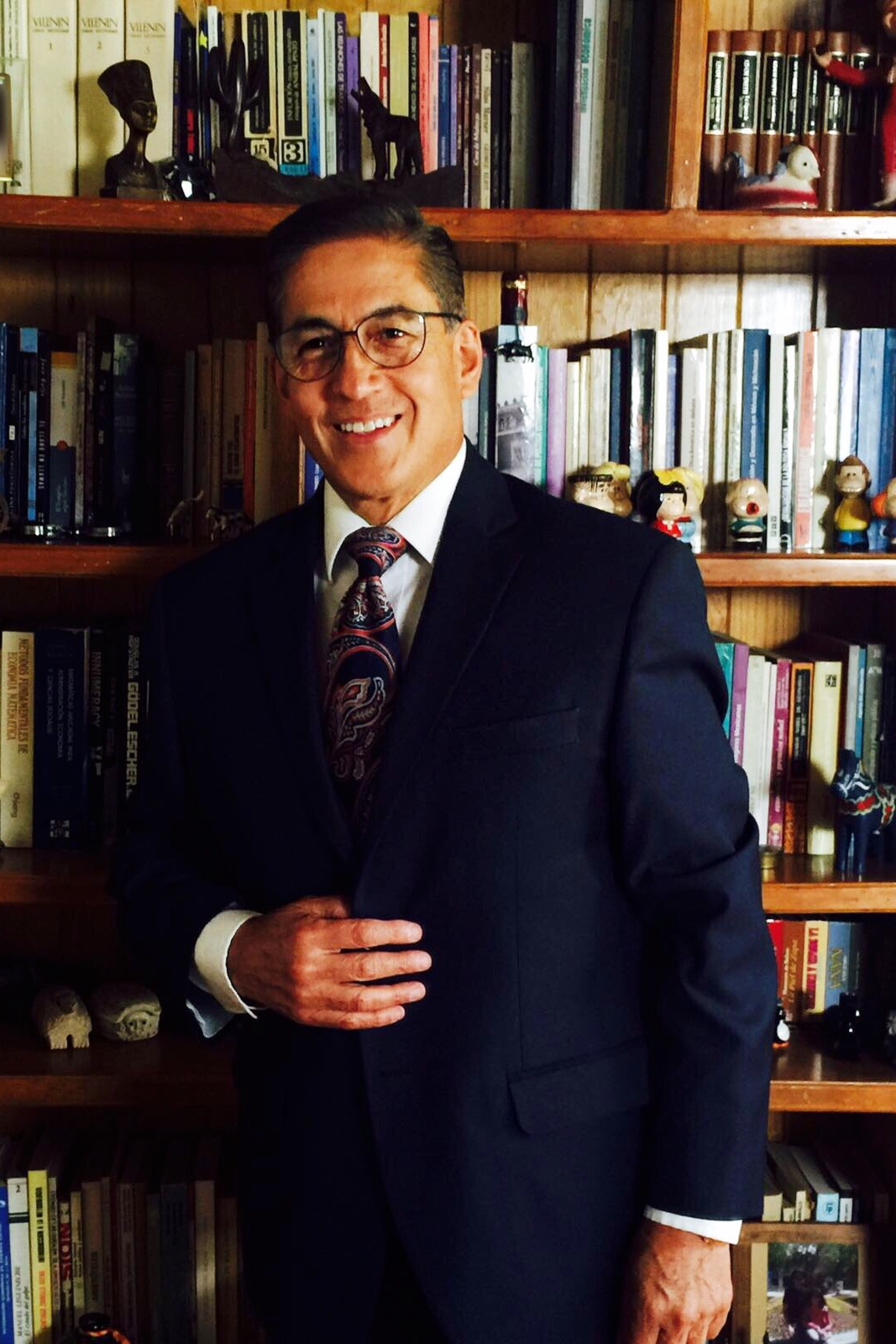 Fernando A. Noriega Ureña